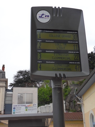 Bornes d'Informations Voyageurs